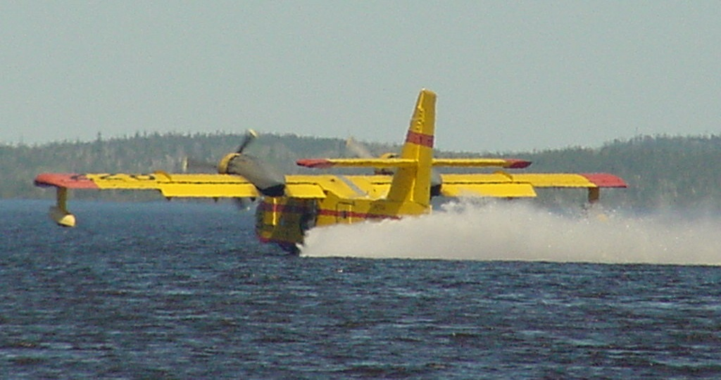 CL-215 en Abitibi, au Québec.